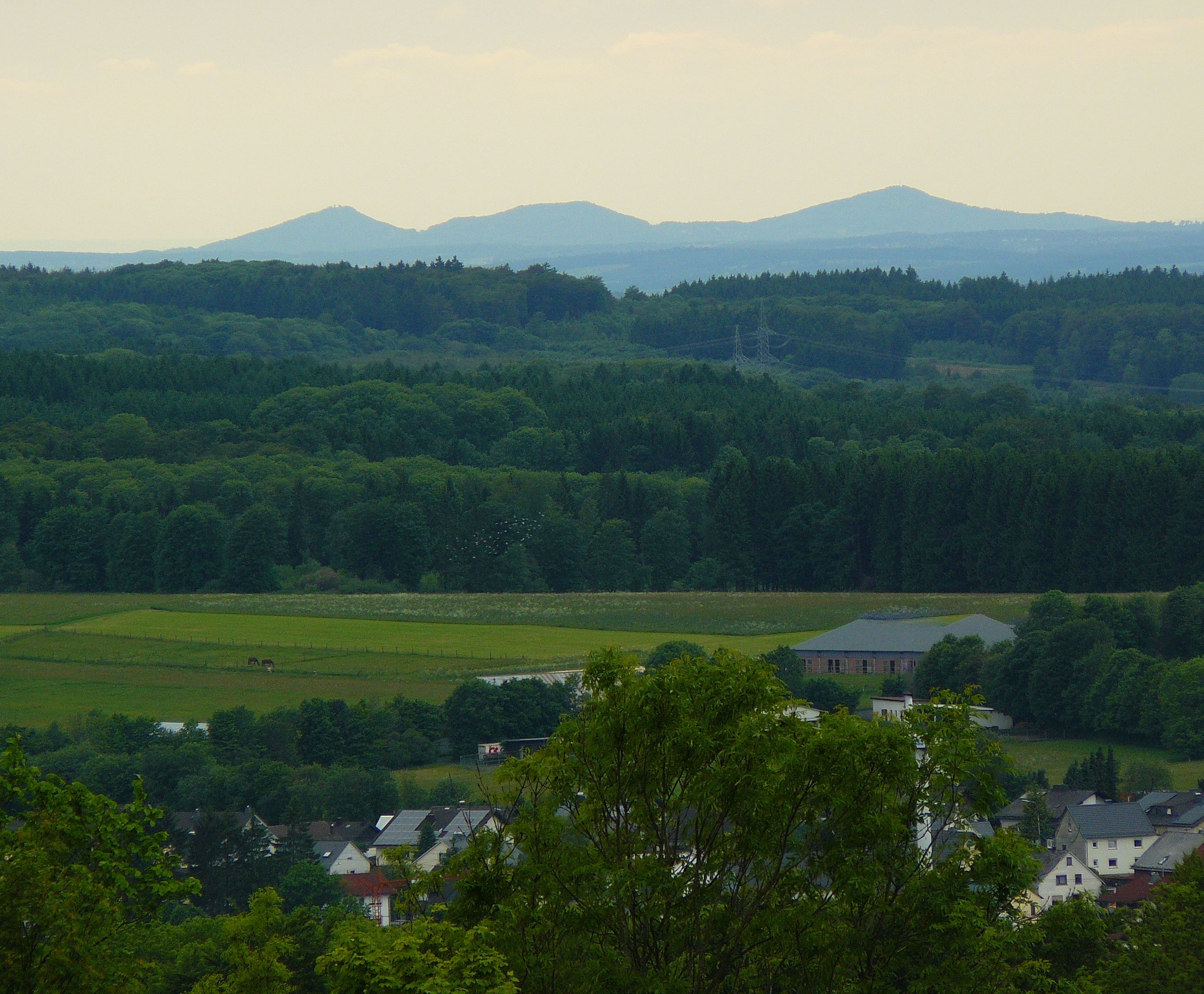 Blick vom Galgenberg nach Westen (im Vordergrund Hof) zu den höchsten Bergen des Siebengebirges: Löwenburg - Lohrberg - Großer Ölberg • Δ = 55 km; mrel = 7,9